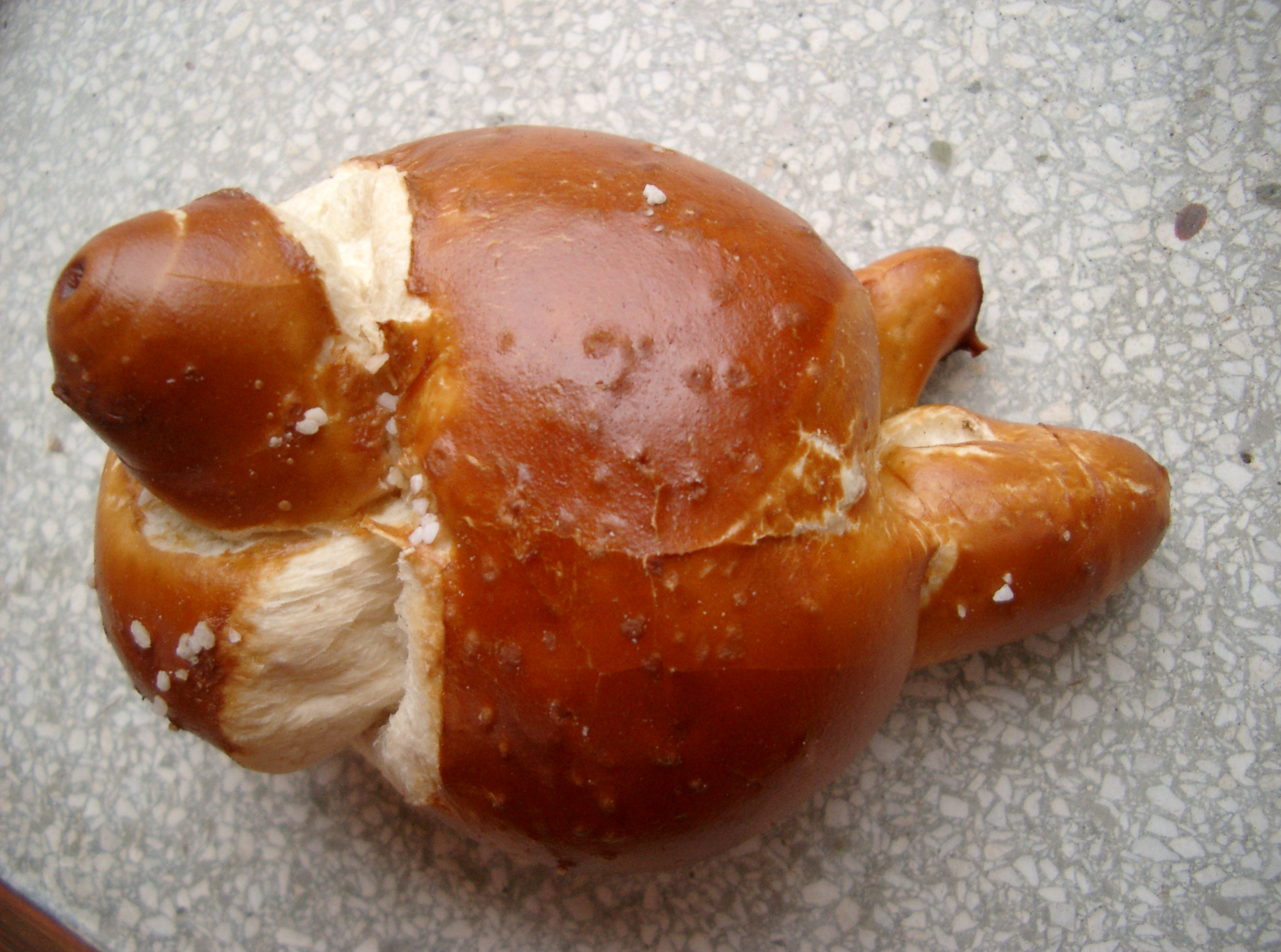 Laugenspatz